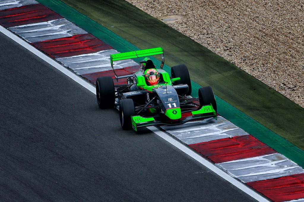 Photographie de Sacha Fenestraz en Eurocup Formula Renault 2.0 en 2017 avec l'équipe Josef Kaufmann Racing sur le Nürburgring